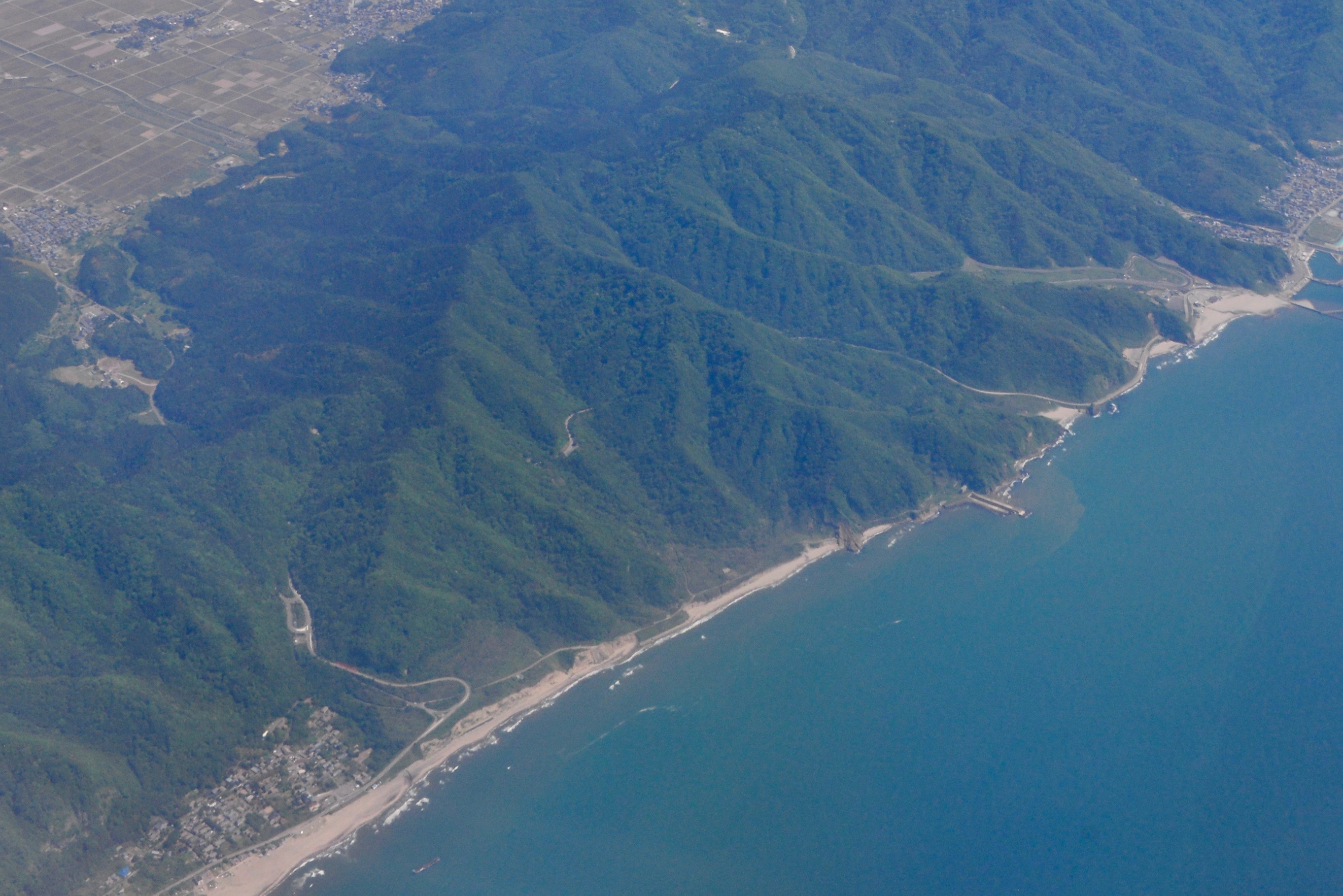 新潟市西蒲区角海浜